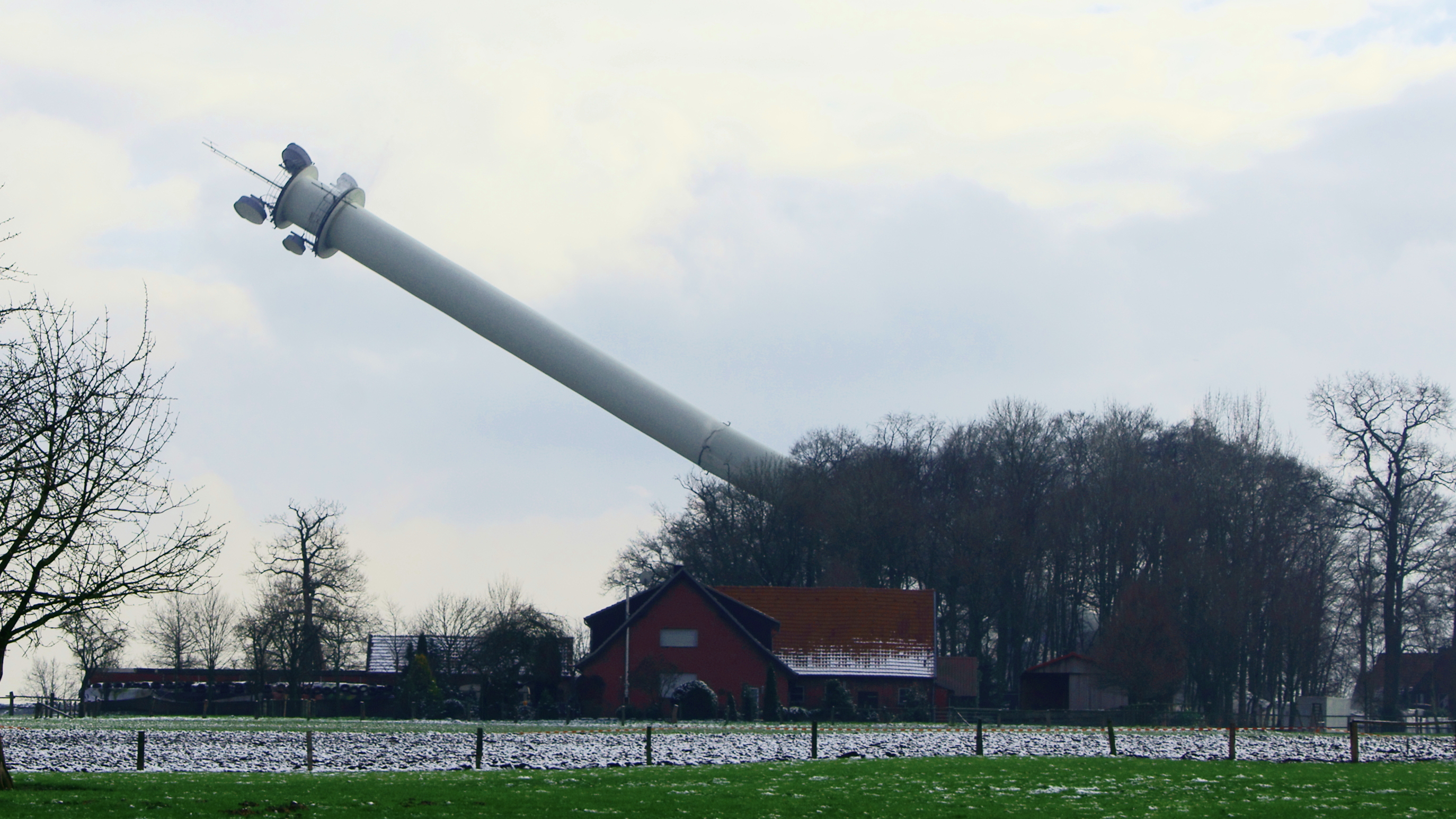 Die "Lange Ida", ein 115 m hoher, 1973 erbauter Richtfunkmast bei Osterwick (Gemeinde Rosendahl, NRW), wurde am 9. Februar 2013 abgerissen. Der Betrieb war zum 30. Juni 2012 eingestellt worden. Hunderte Schaulustige verfolgten die Sprengung des Turms, der vom Volksmund nach der Wirtin einer benachbarten Gaststätte seinen Namen erhielt.